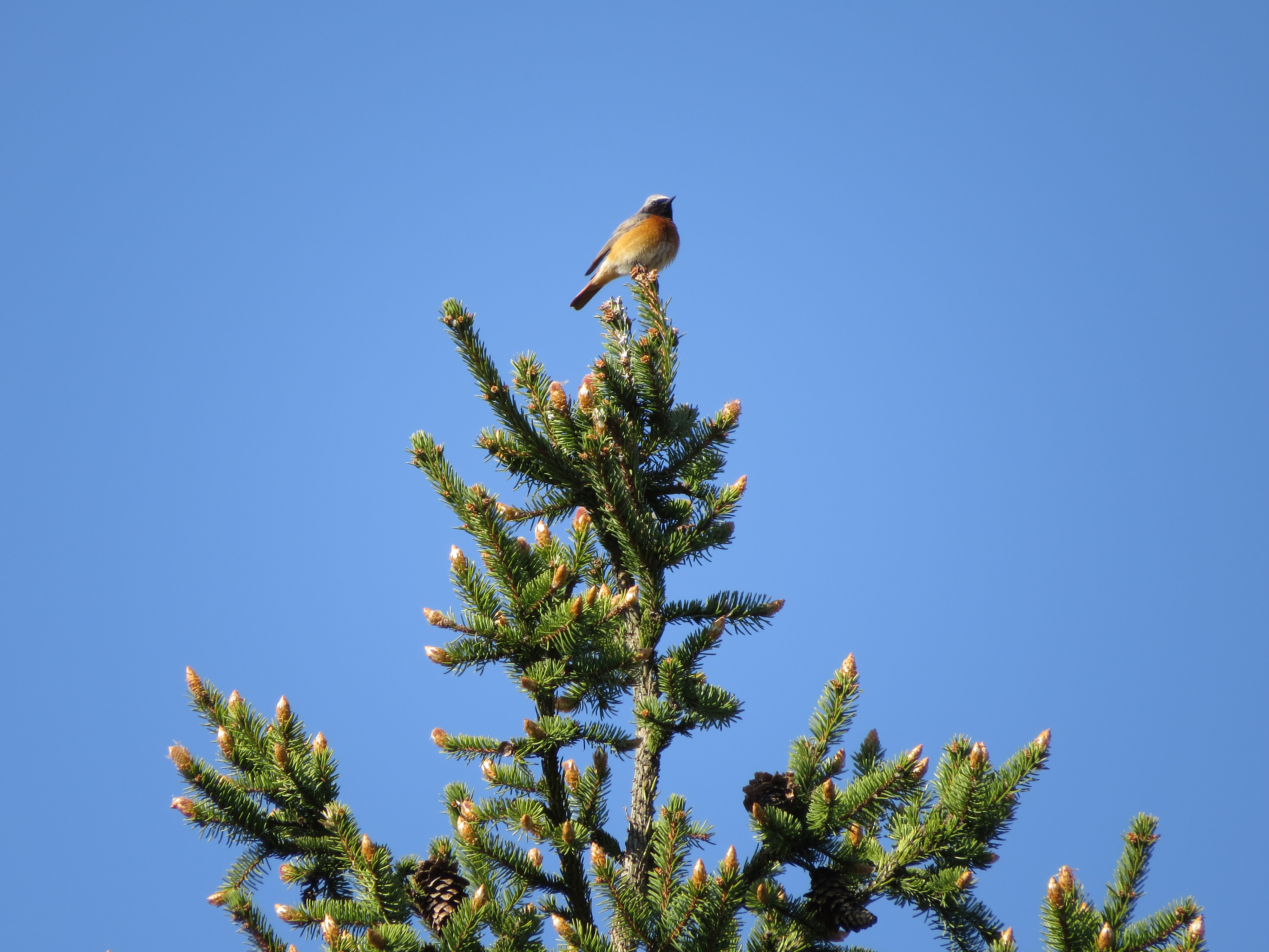 Обыкновенная горихвостка, подмосковье